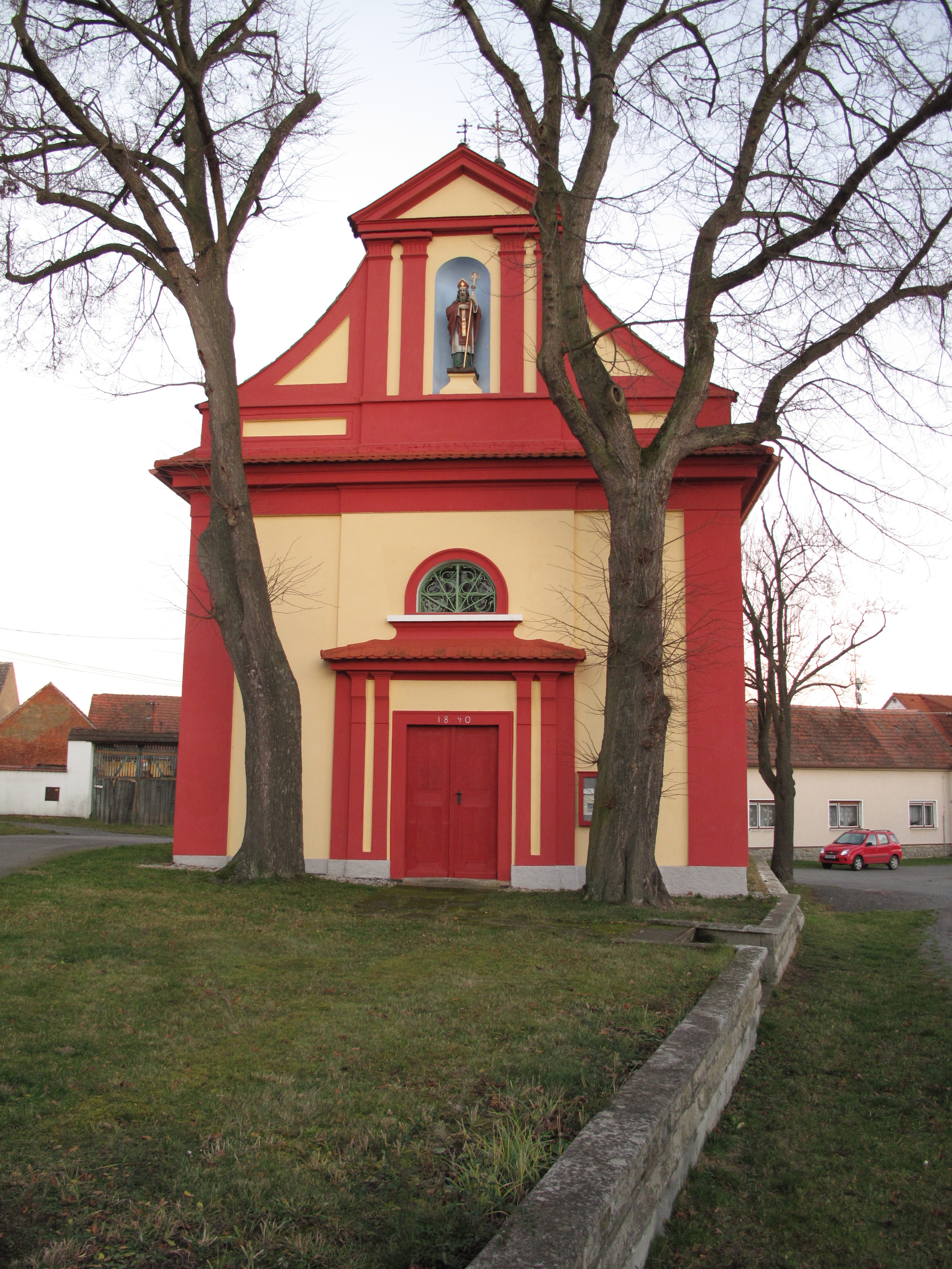 Kaple v Otěšicích. Okres Plzeň-jih, Česká republika.